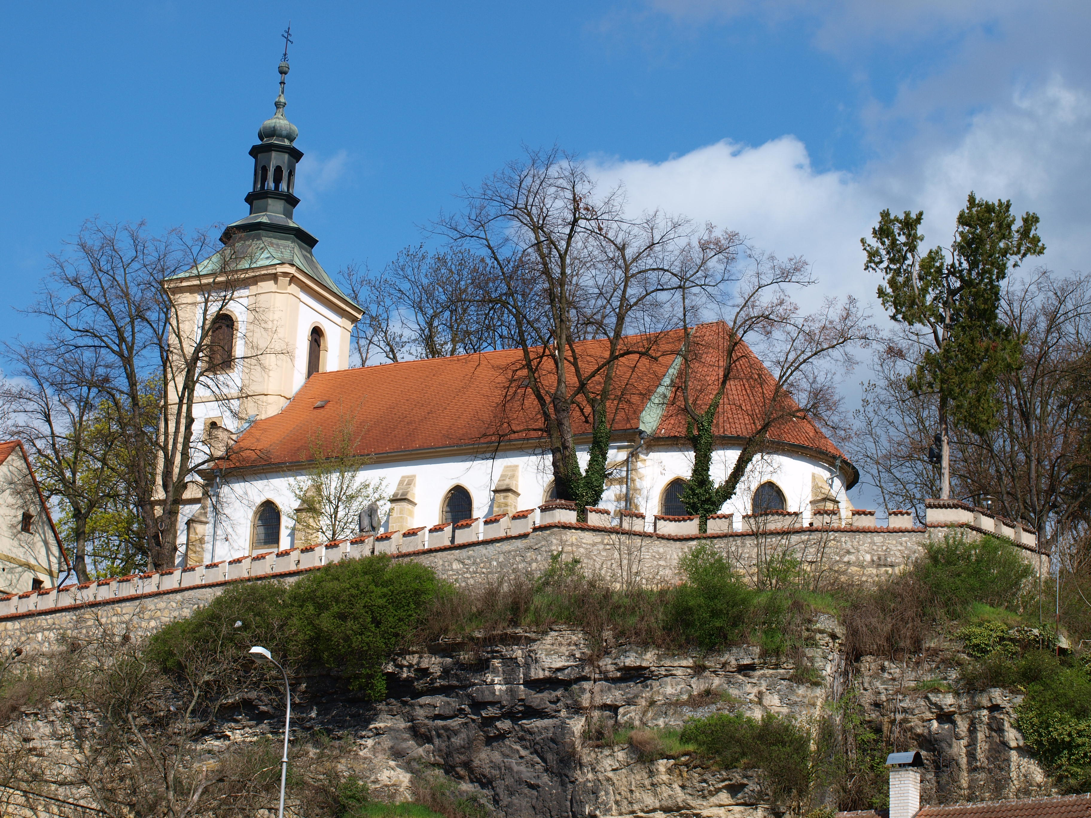 Kostel sv. Havla u náměstí Míru, Mladá Boleslav Číslo rejstříku ÚSKP: 33578/2-1653